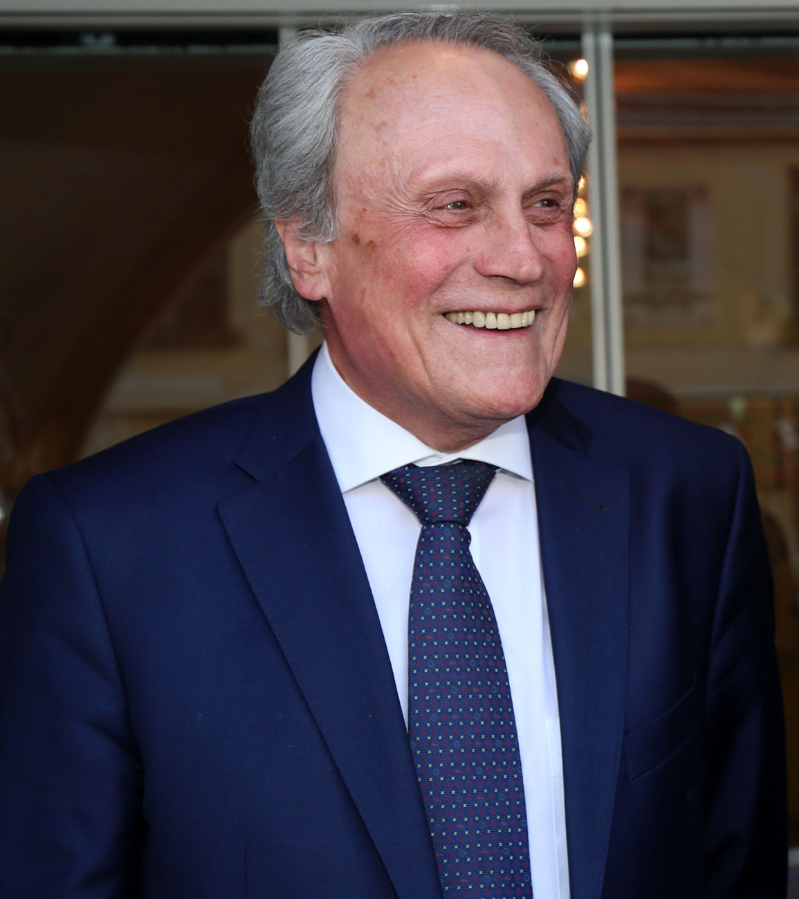 Prof. Dr. Josef Höchtl, Präsident der "Österreichischen Gesellschaft für Völkerverständigung"